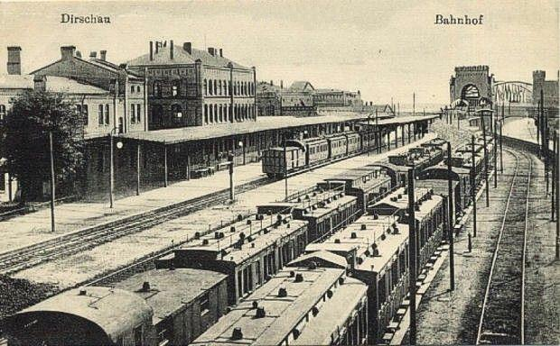 Dworzec kolejowy w Tczewie.